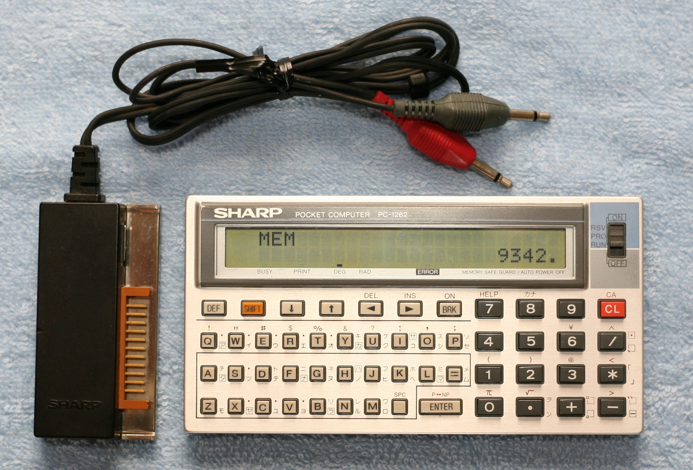 ポケットコンピュータ SHARP PC-1262 とオーディオカセットインタフェース